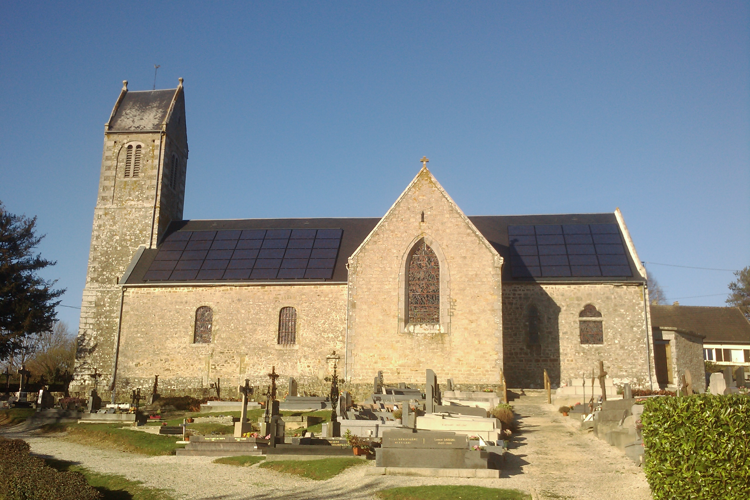 Église Saint-Pierre du Chefresne